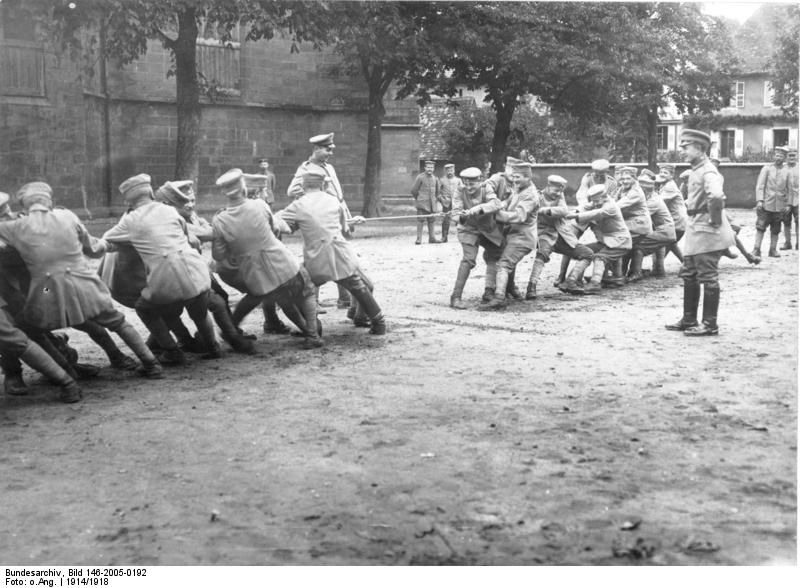 1. Weltkrieg 1914-1918 Zeitvertreib unserer Feldgrauen hint. der westl. Front Tauziehen